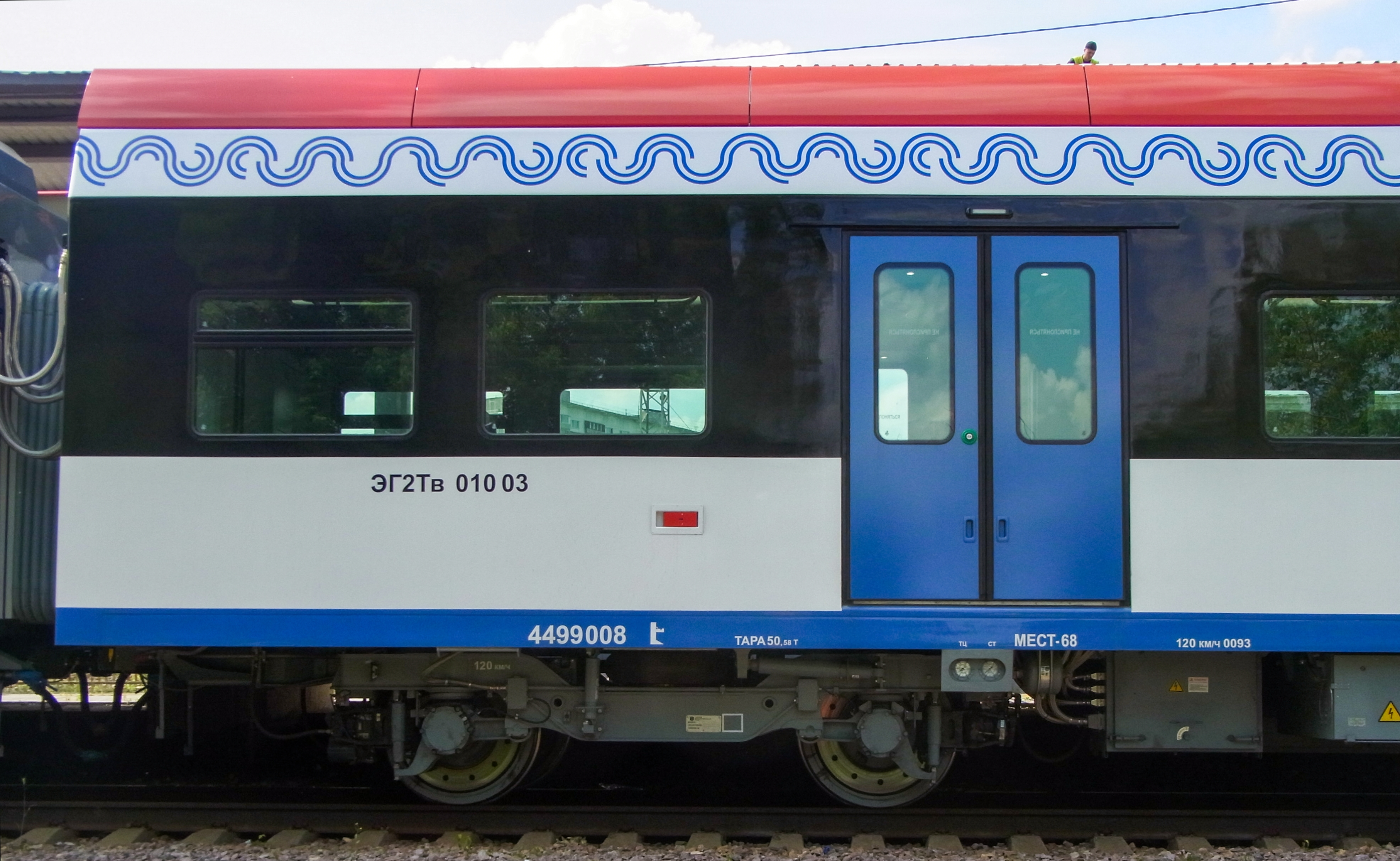 Боковая маркировка вагона ЭГ2Тв-010-03